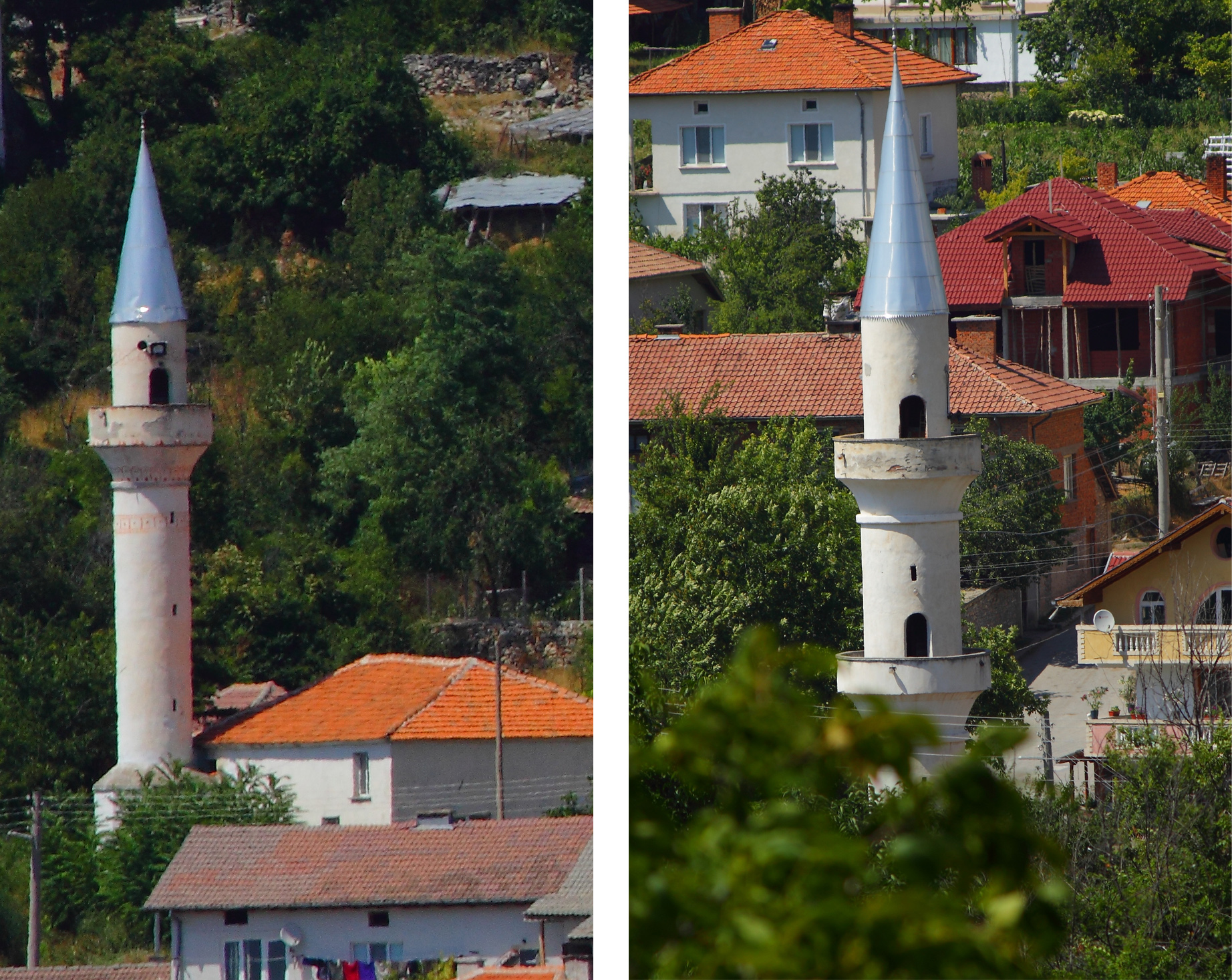 Изглед към Горната и Долната джамия, съответно.